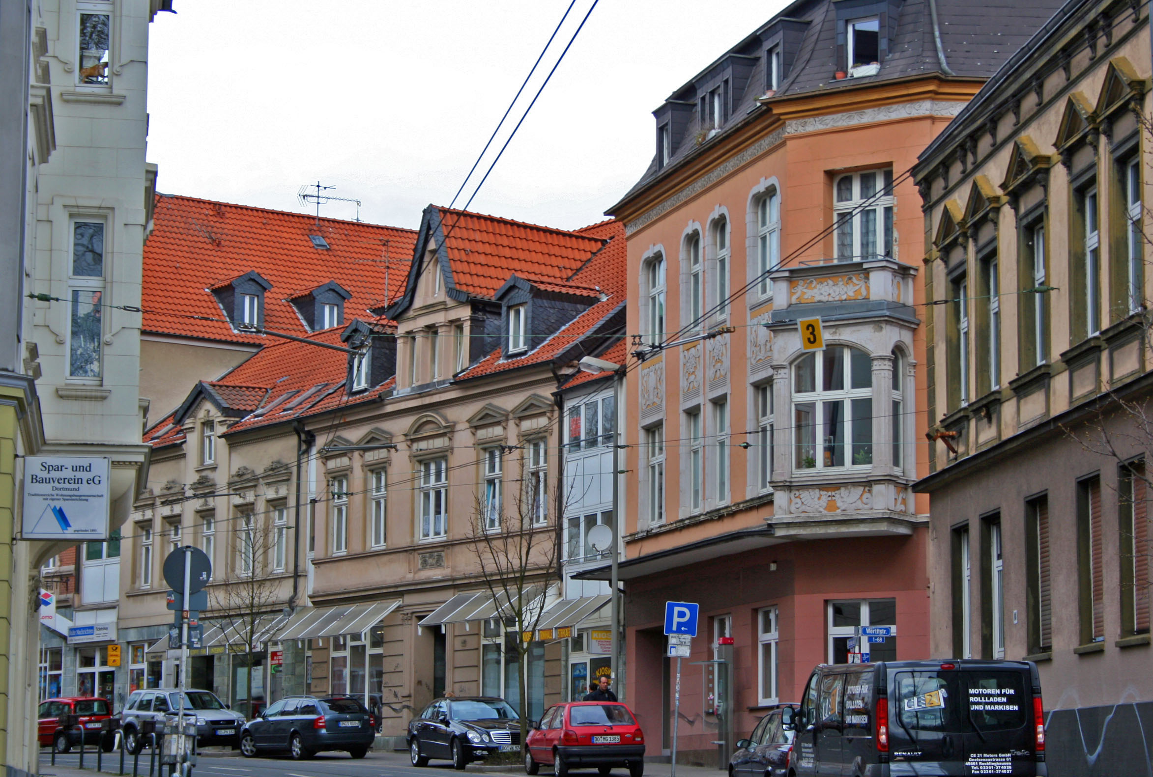 Stadtraum Dorstfelder HellwegThis is a photograph of an architectural monument., no. 0